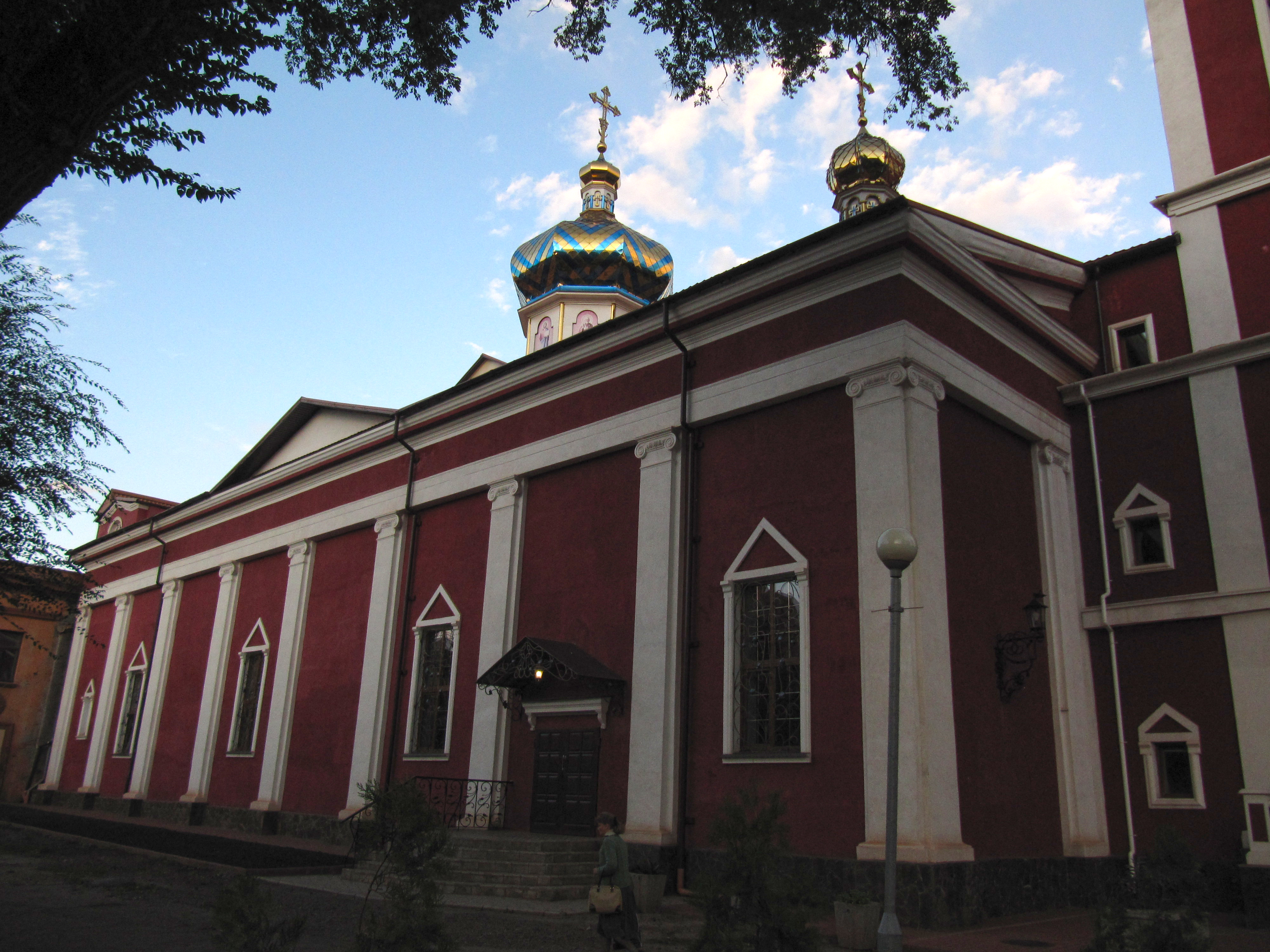 Кінотеатр імені В.І. Леніна. Мала зала, яку було перероблено під церкву у 2000-них роках